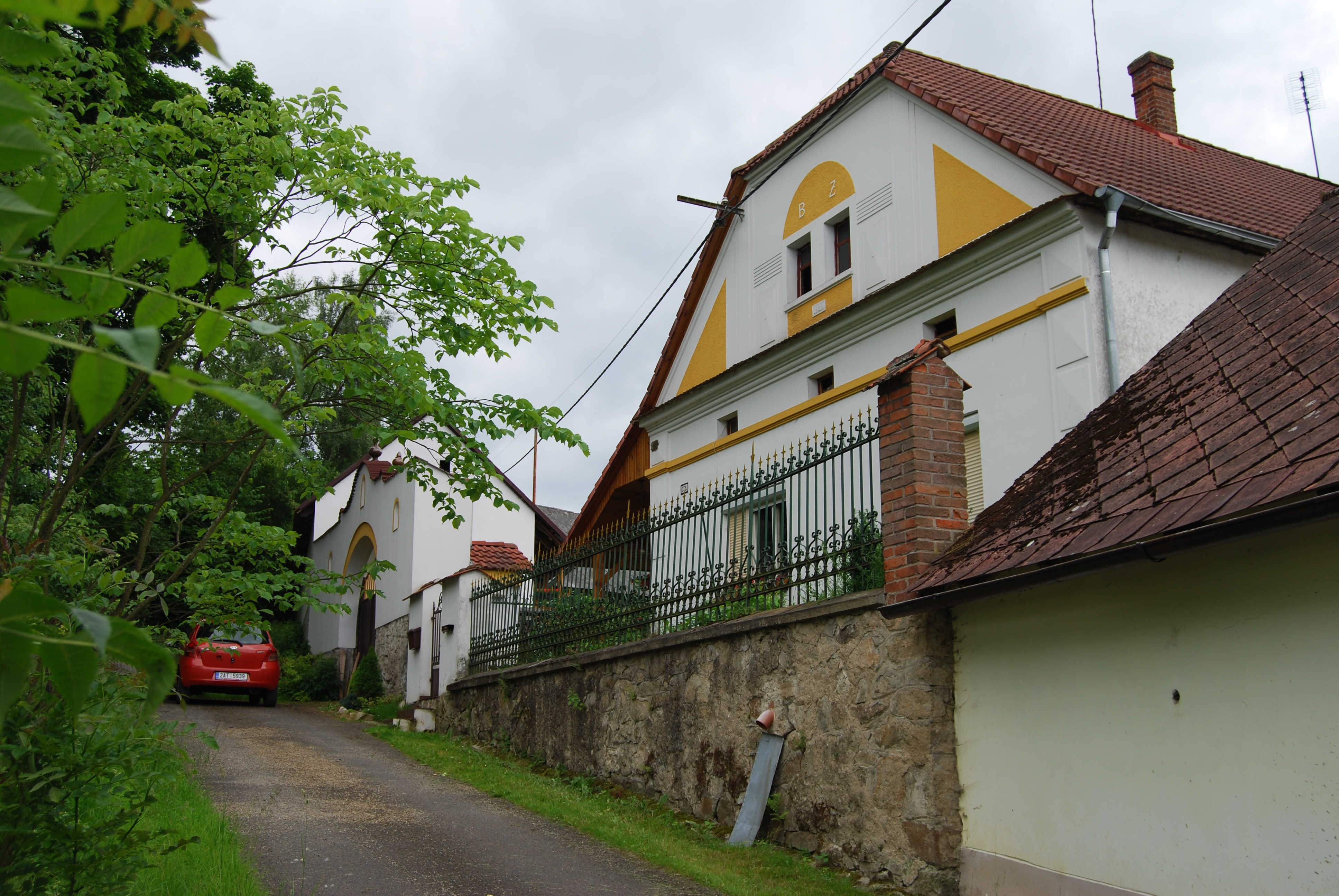 Usedlost čp. 3 v obci. Osletín je část obce Zhoř v okrese Písek. Česká republika.